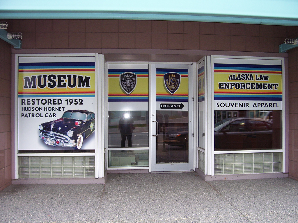 alaska state trooper museumalaska state trooper museum